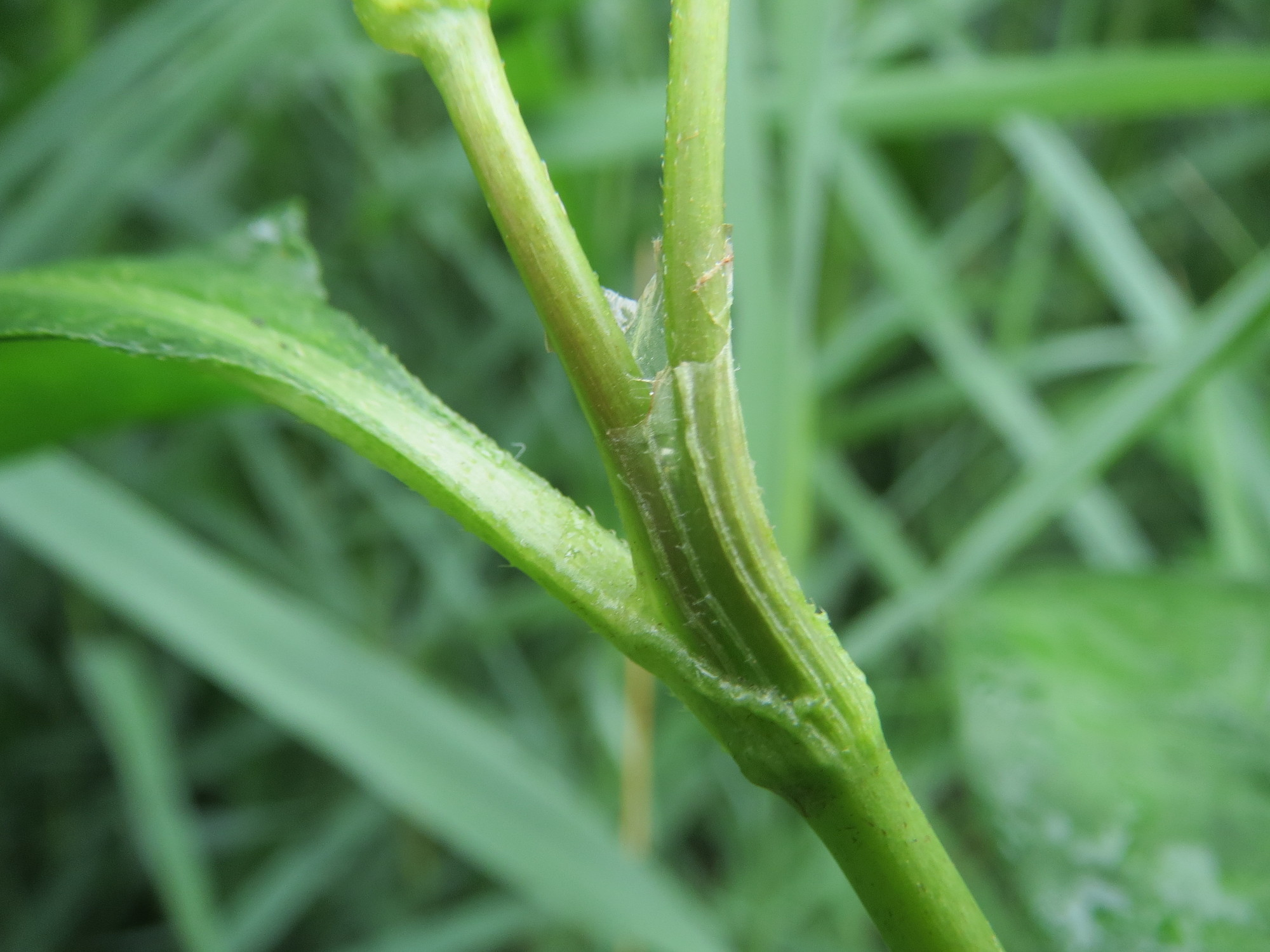 Ampfer-Knöterich (Persicaria lapathifolia) bei Reilingen